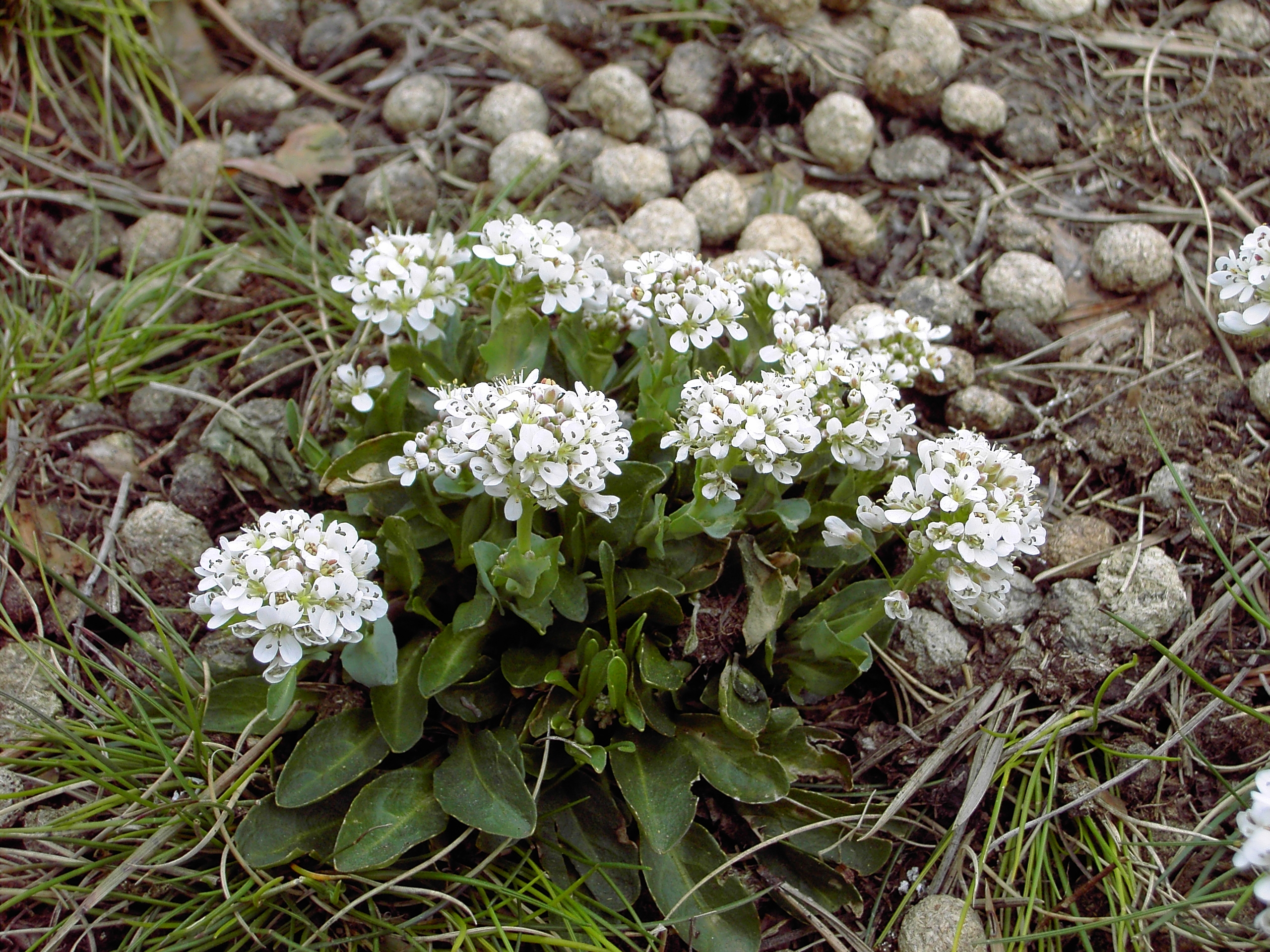 Das Foto zeigt das am Schlangenberg (Naturschutzgebiet Schlangenberg) wachsende Galmei-Täschelkraut (Thlaspi calaminare, syn. Noccaea caerulescens subsp. calaminaris)